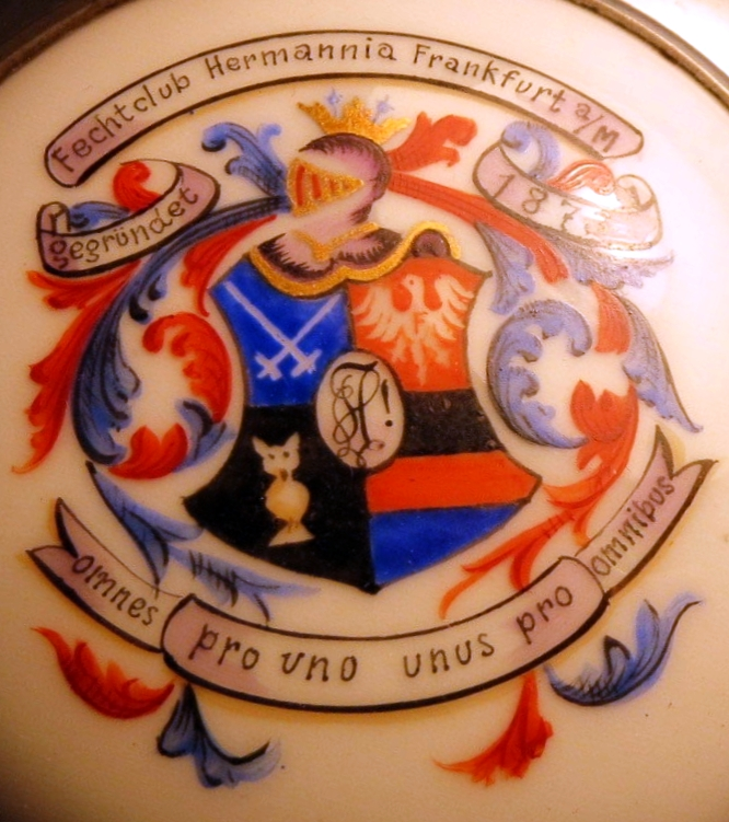 Wappen des Fechtclubs Hermannia in Frankfurt am Main